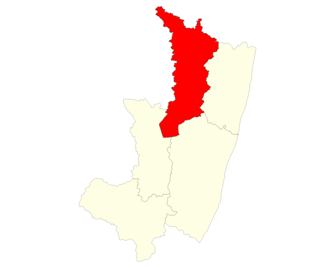 Localisation du district de Vondrozo dans la région Atsimo Atsinanana